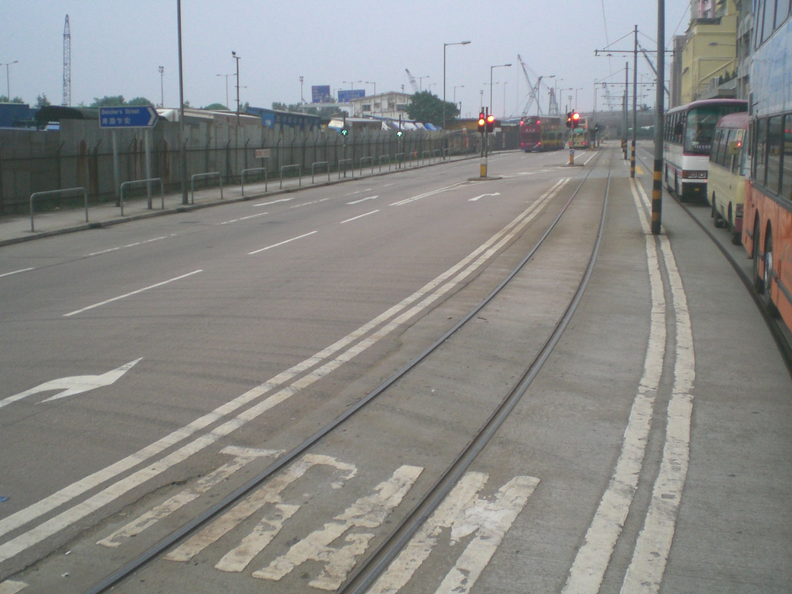 堅彌地城海旁 香港電車軌道